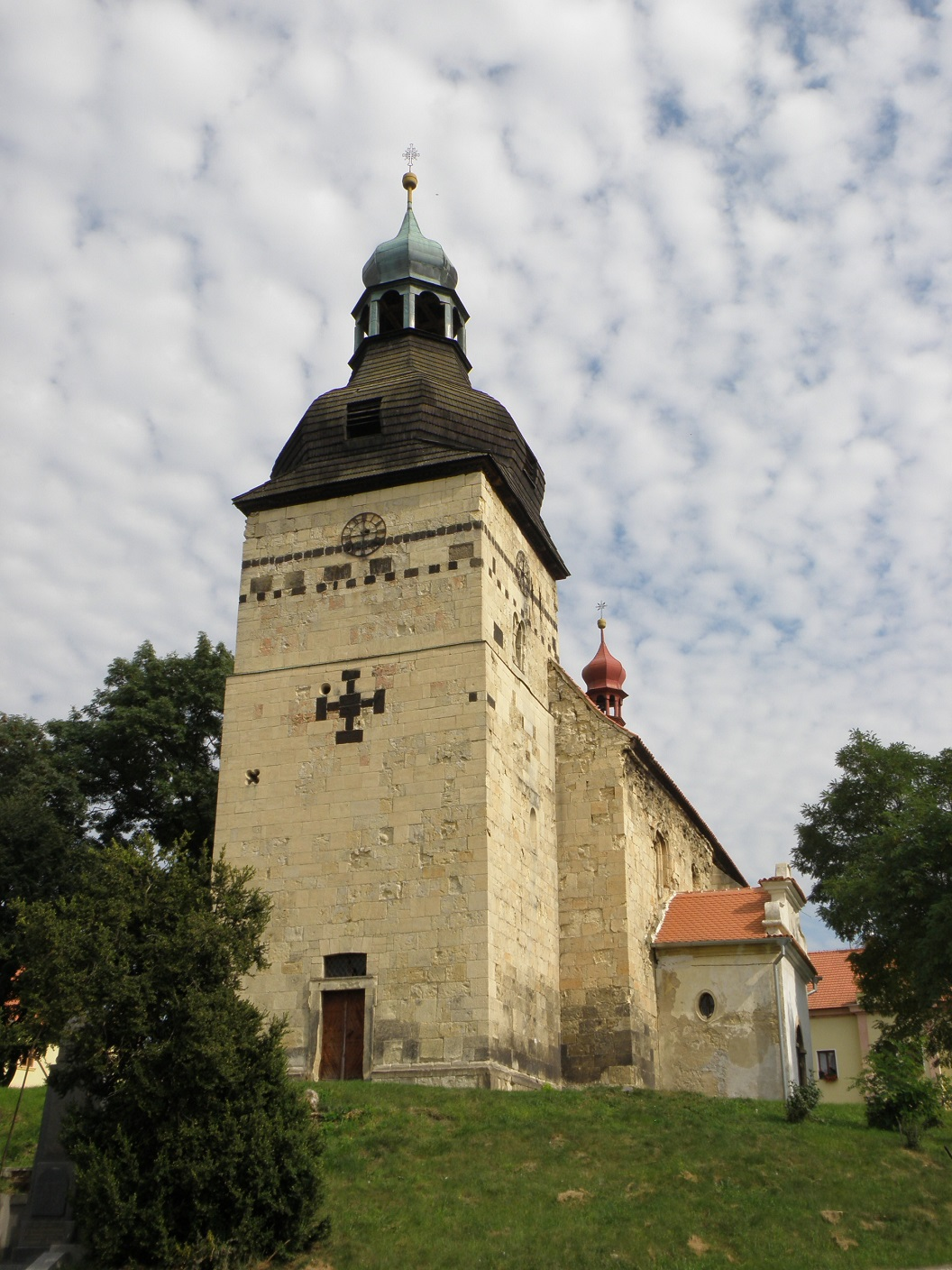 Kostel Stětí sv. Jana Křtitele (Libčeves), Libčeves